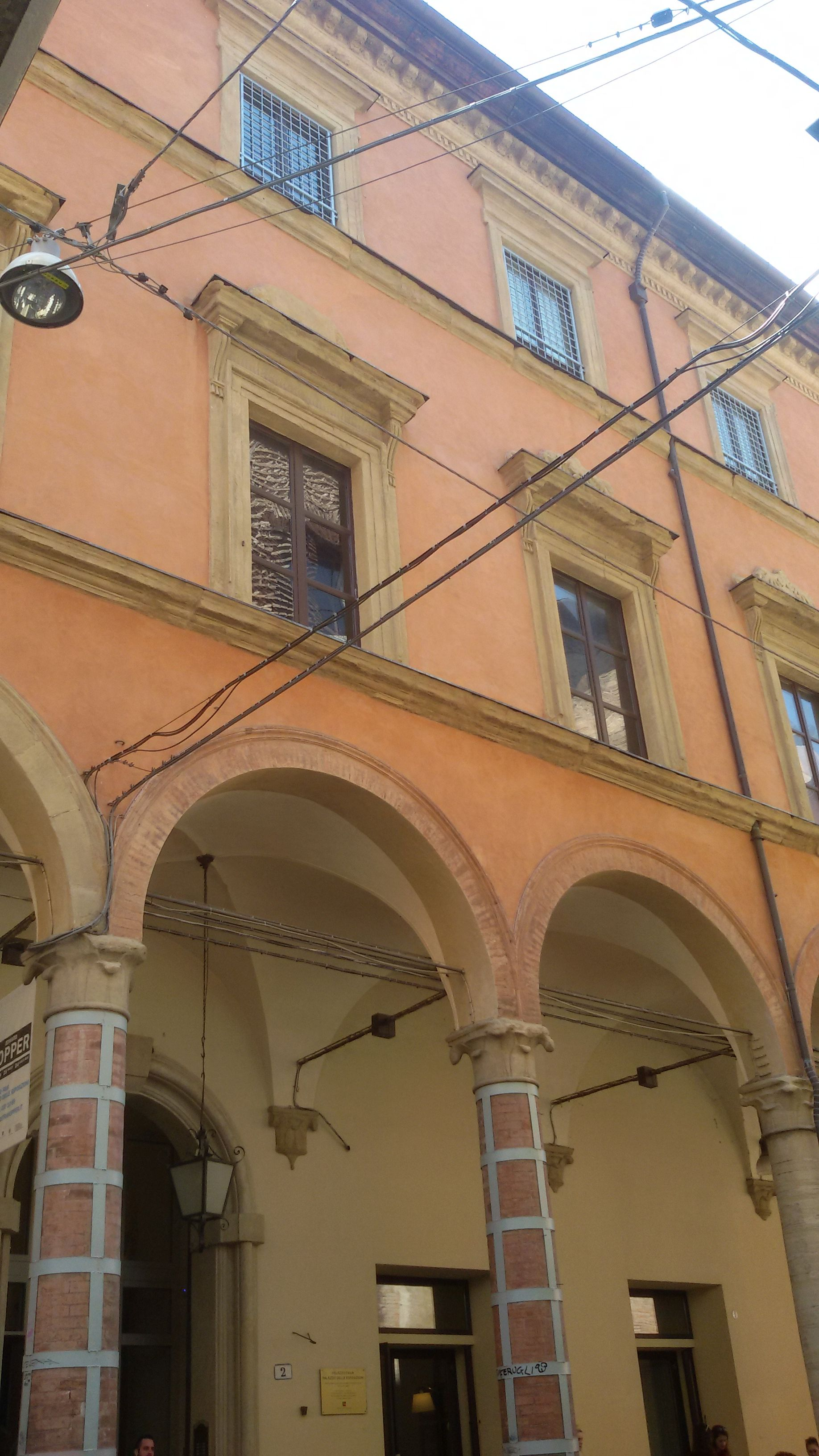 Palazzo Fava. Sede del Palazzo delle esposizioni